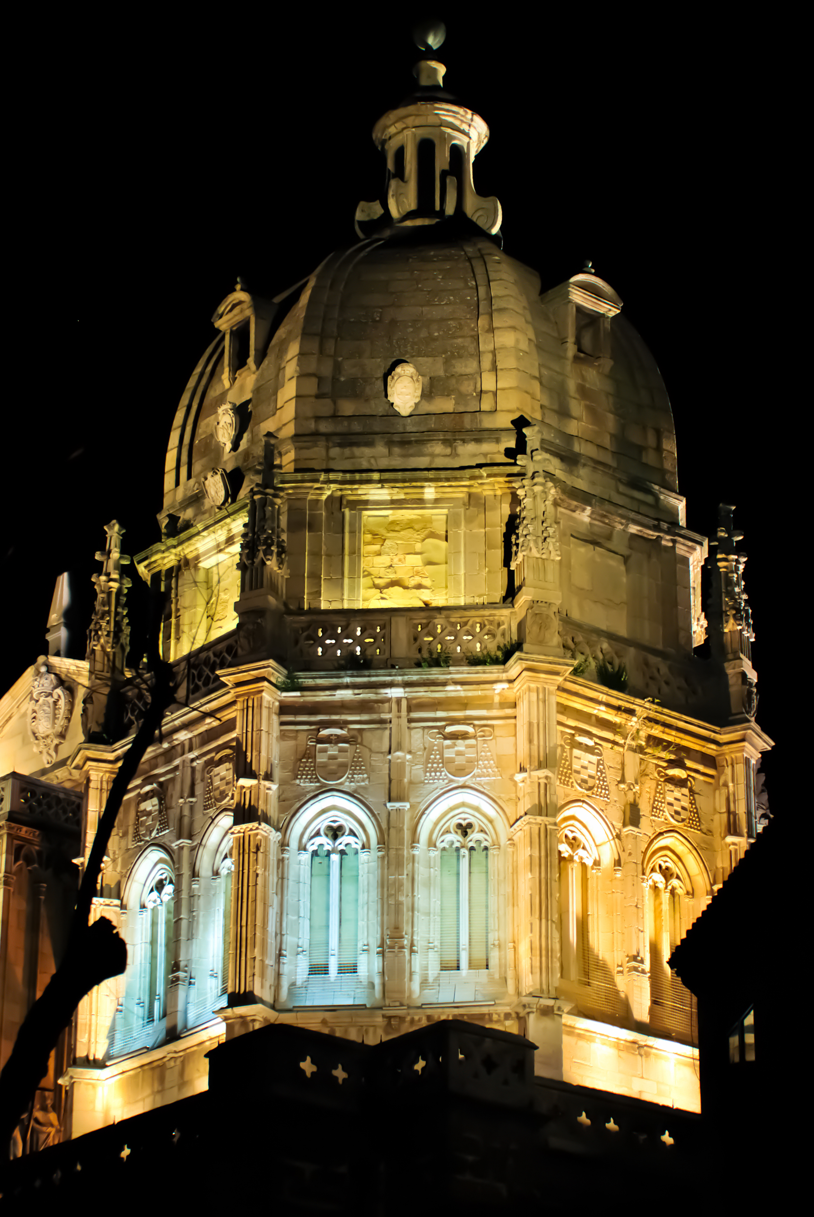 Exterior de la capilla mozárabe de la Catedral Primada, tal y como puede ser vista de noche desde la Plaza del Ayuntamiento. Toledo, España. 2010